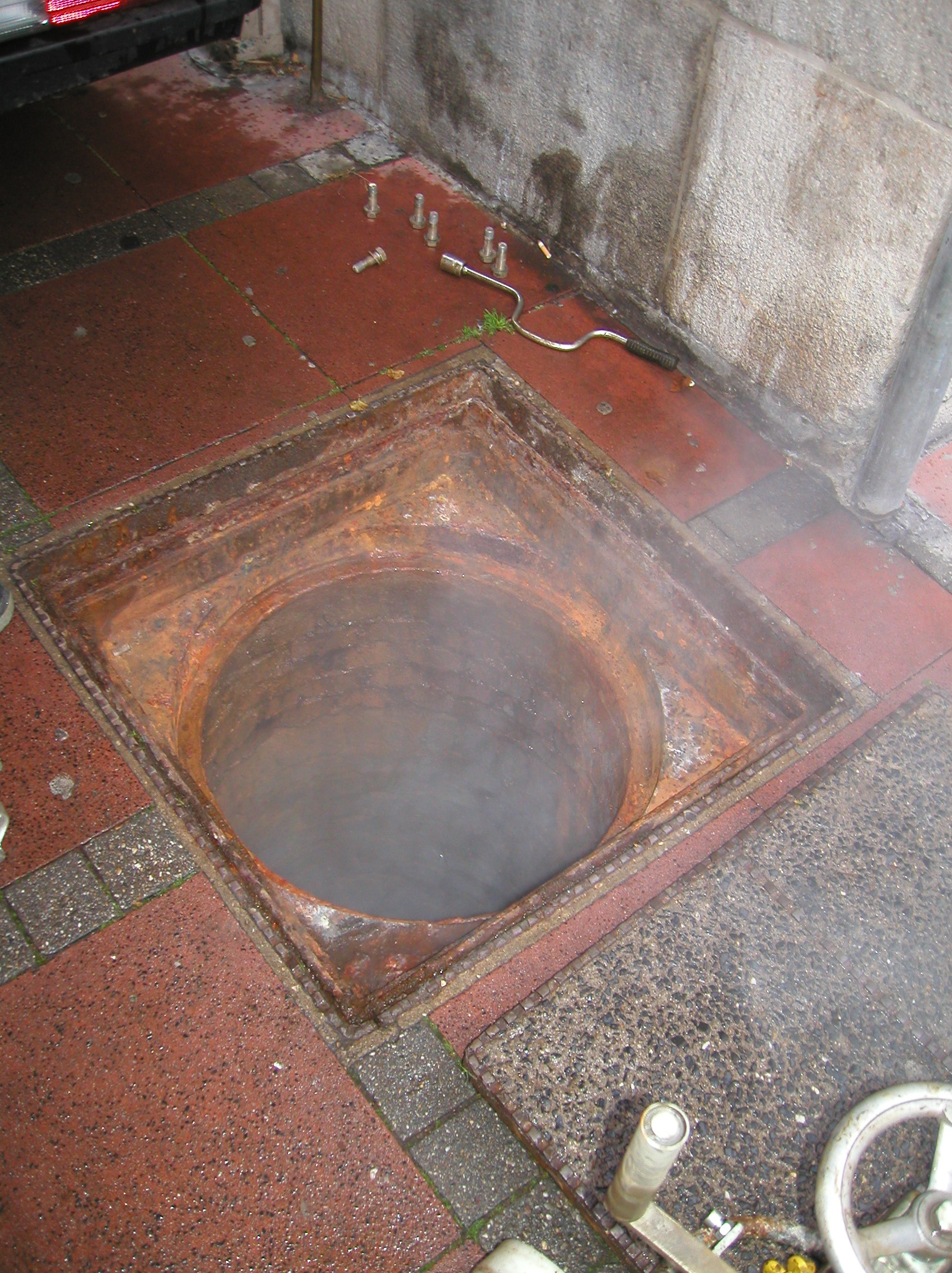 Überbaute Fassung der Schlangenbadquelle am Burtscheider Markt